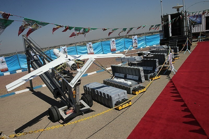 Ido: Iranian Yasir drone